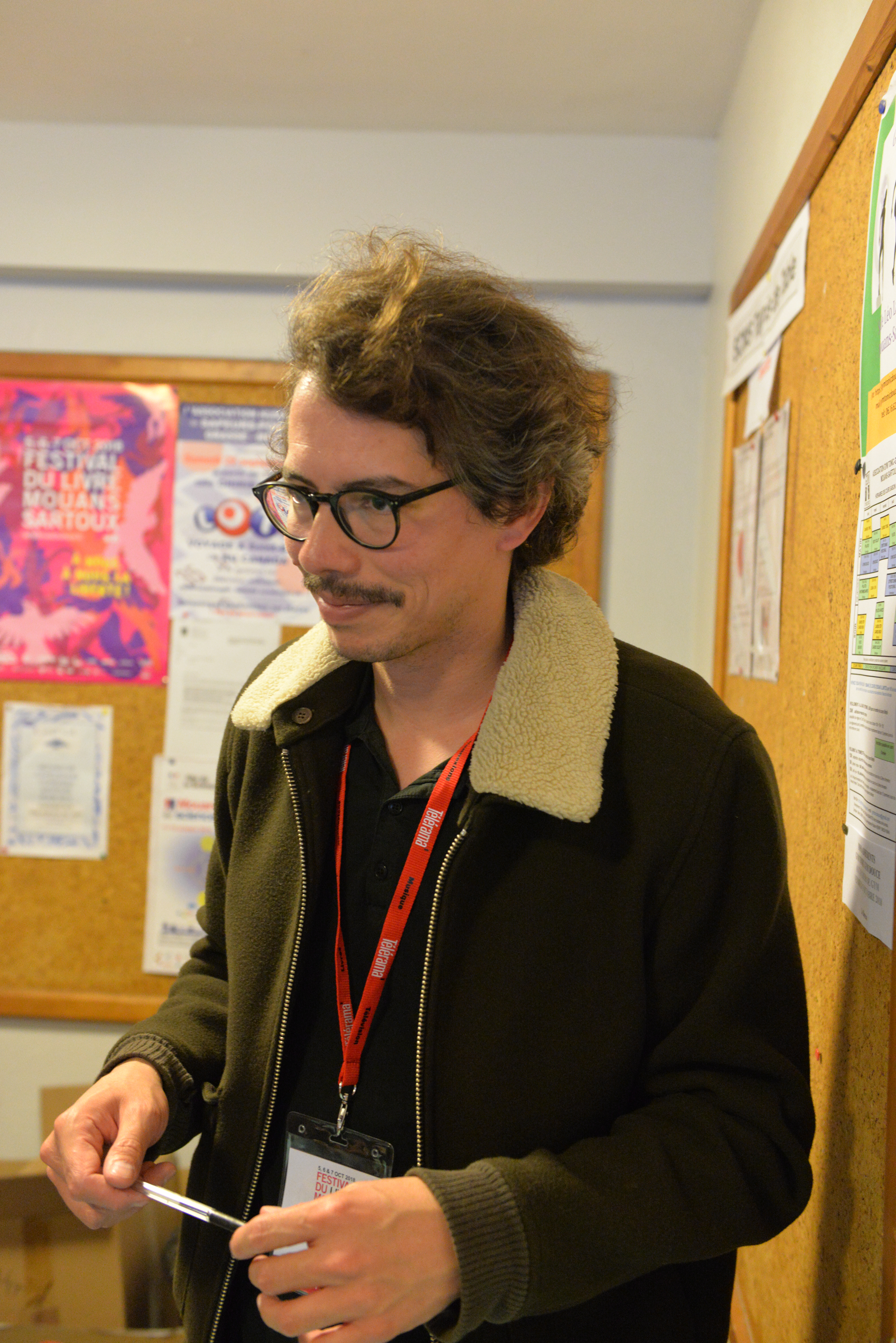 Thomas Porcher lors du festival du livre de Mouans-Sartoux le 7 octobre 2018